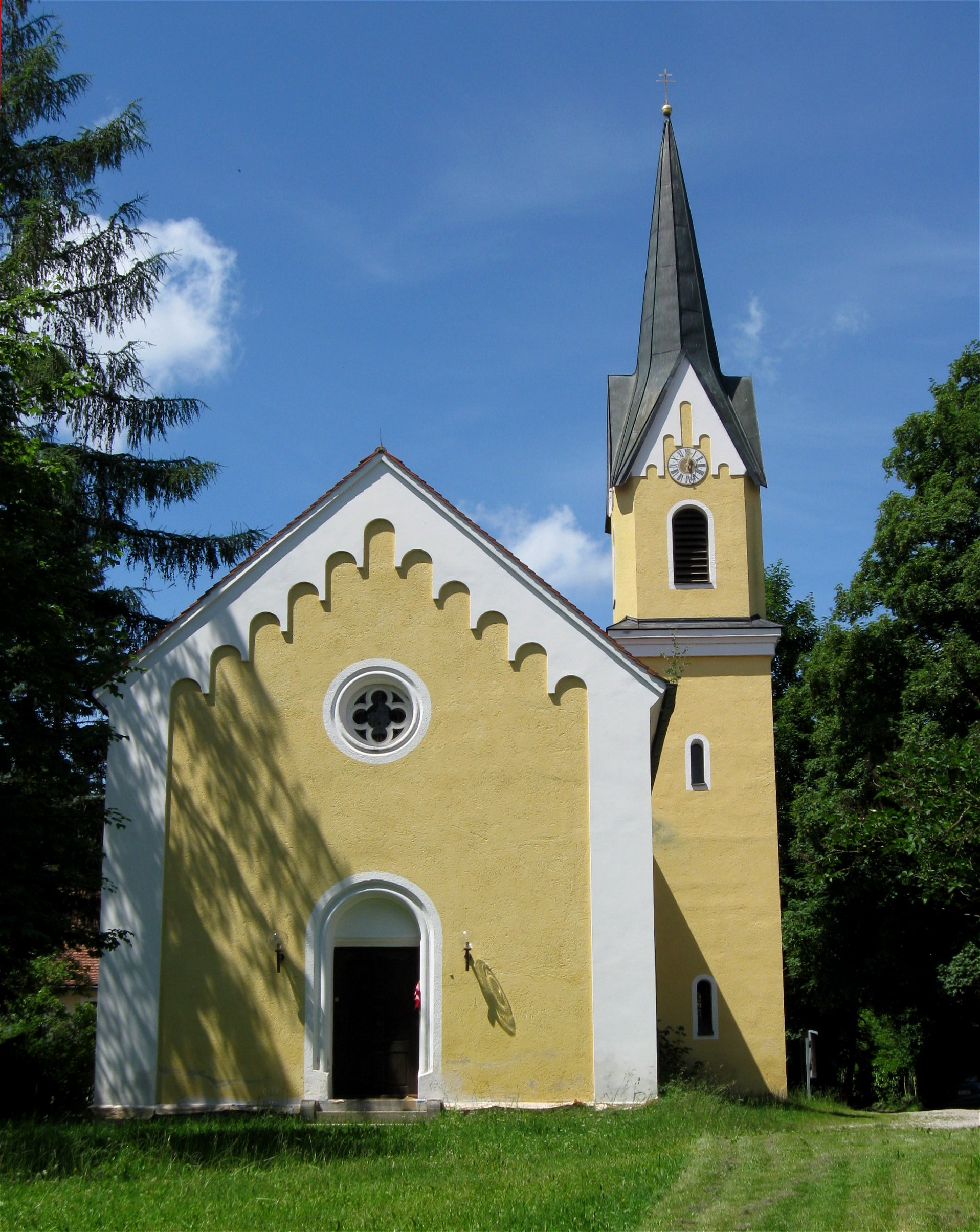 Nantesbuch 3; Kuratiekirche Maria Himmelfahrt; Neubau 1840; mit Ausstattung.